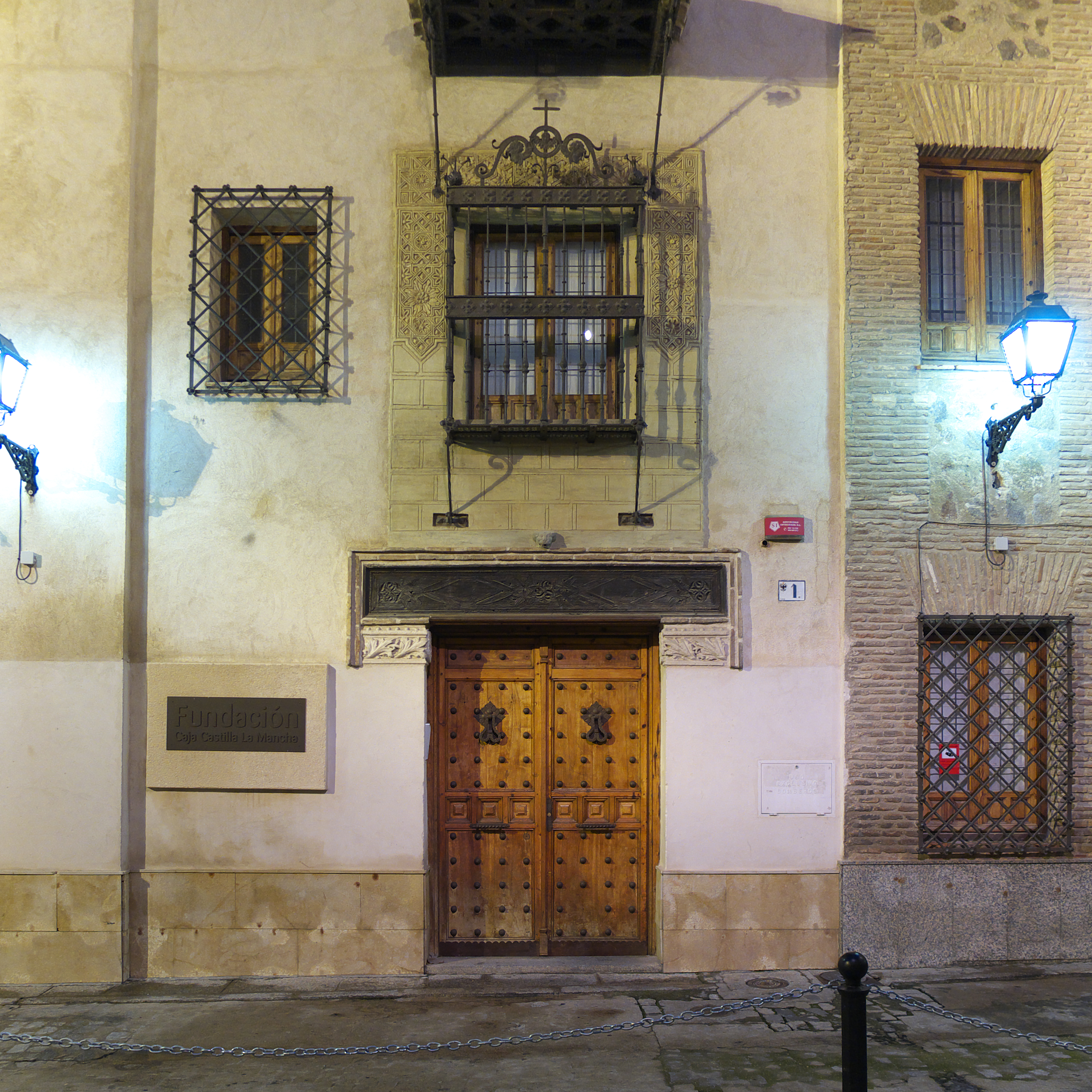 Posible sede del Palacio de Justicia de la Inquisición en Toledo